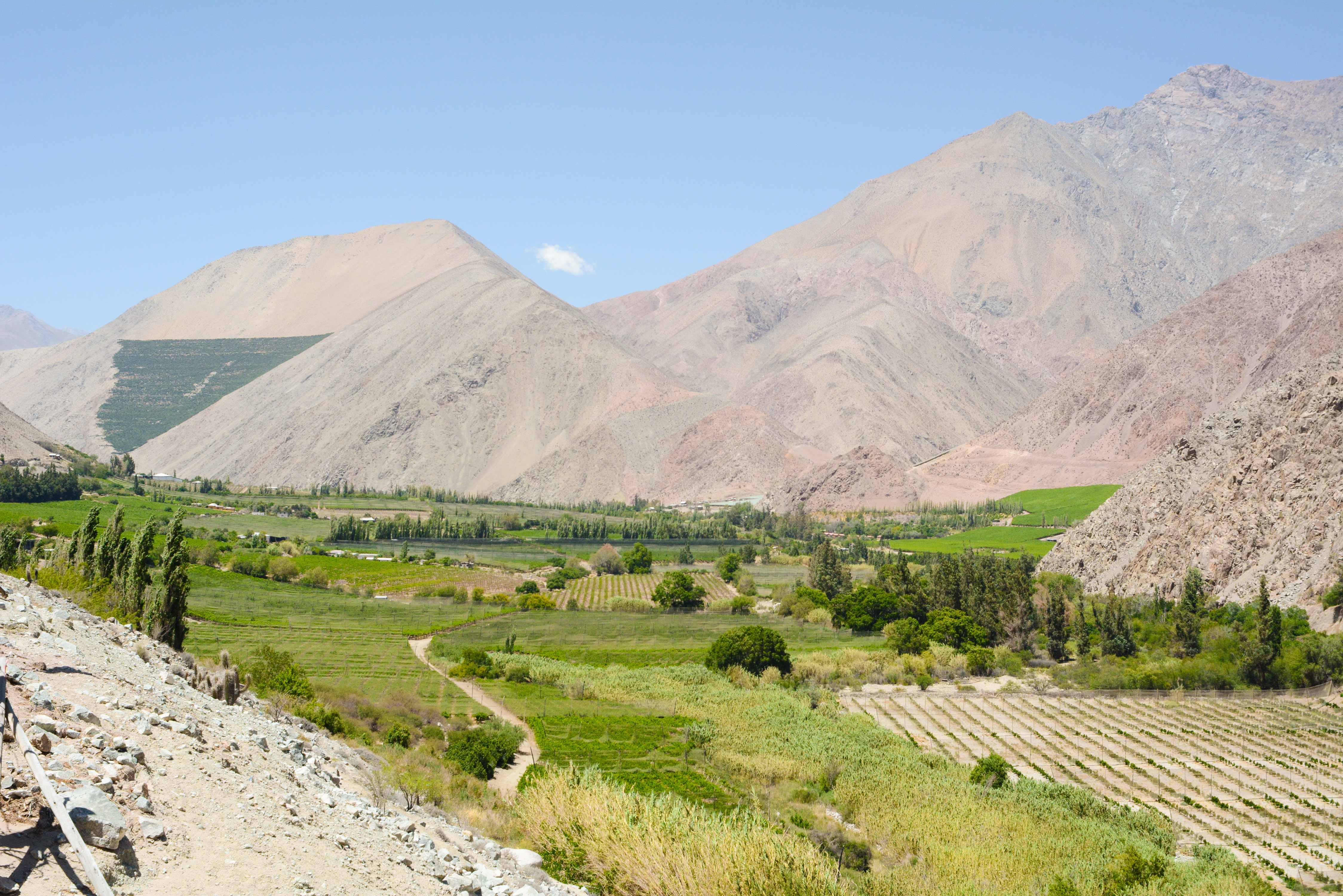 Valle del Elqui, Chile